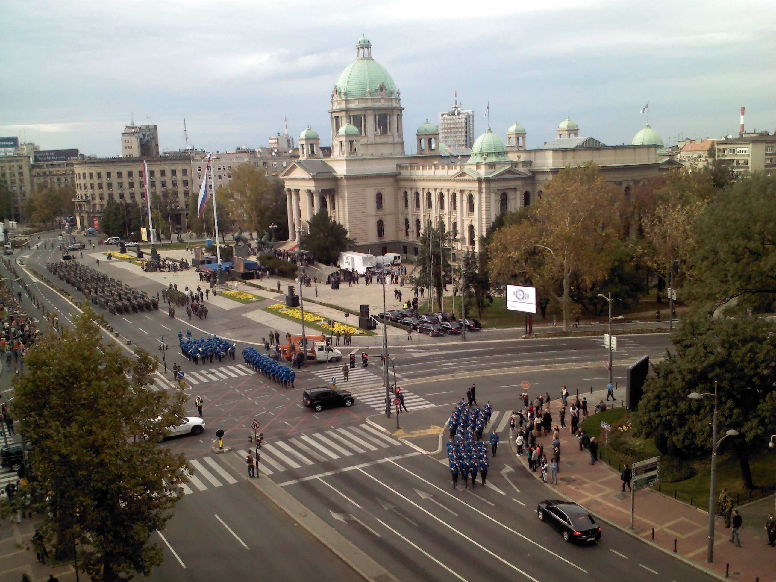 Поглед на Дома Народне скупштине Републике Србије и церемонију промоције нових официра 134. класе Војне Академије.